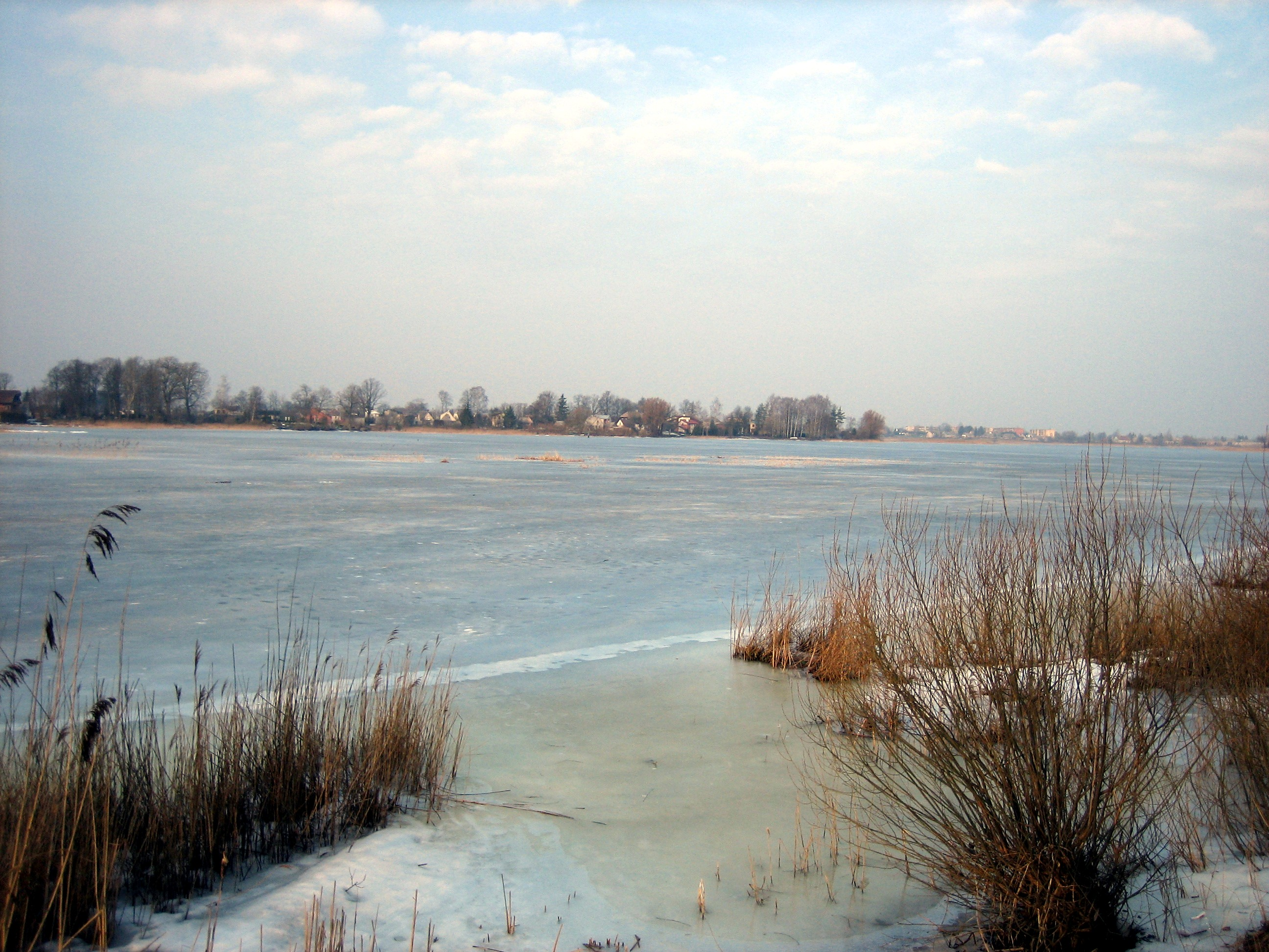 Širvėnos ežeras